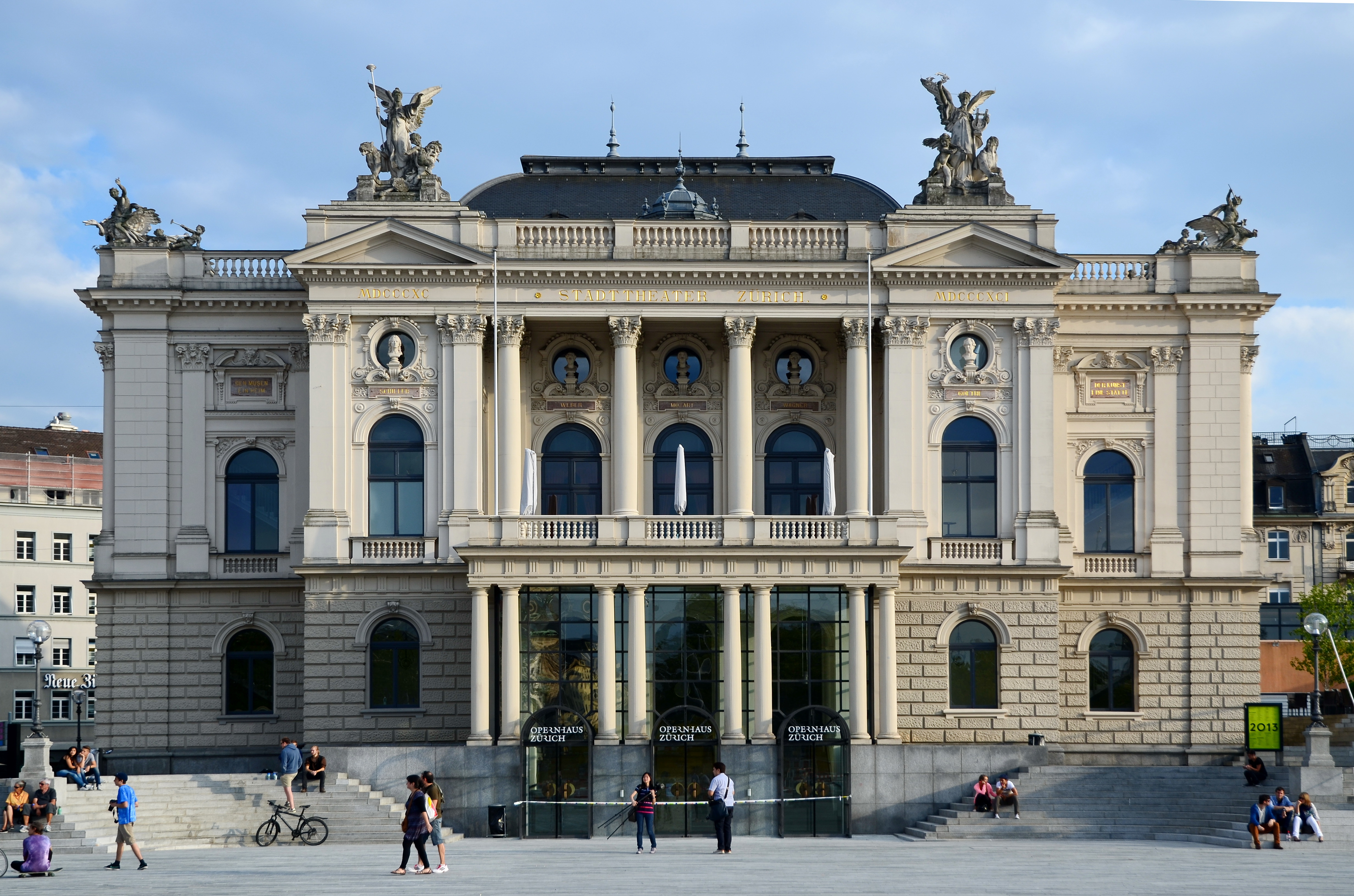 Sechseläutenplatz, Opernhaus in Zürich